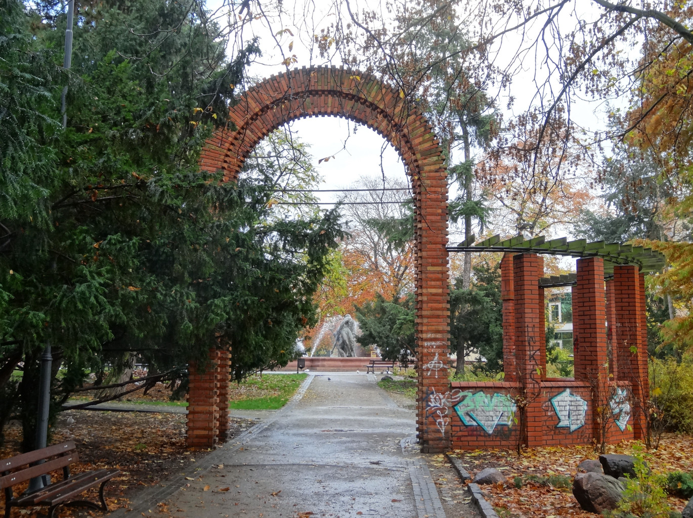 Park im. Kazimierza Wielkiego w Śródmieściu Bydgoszczy